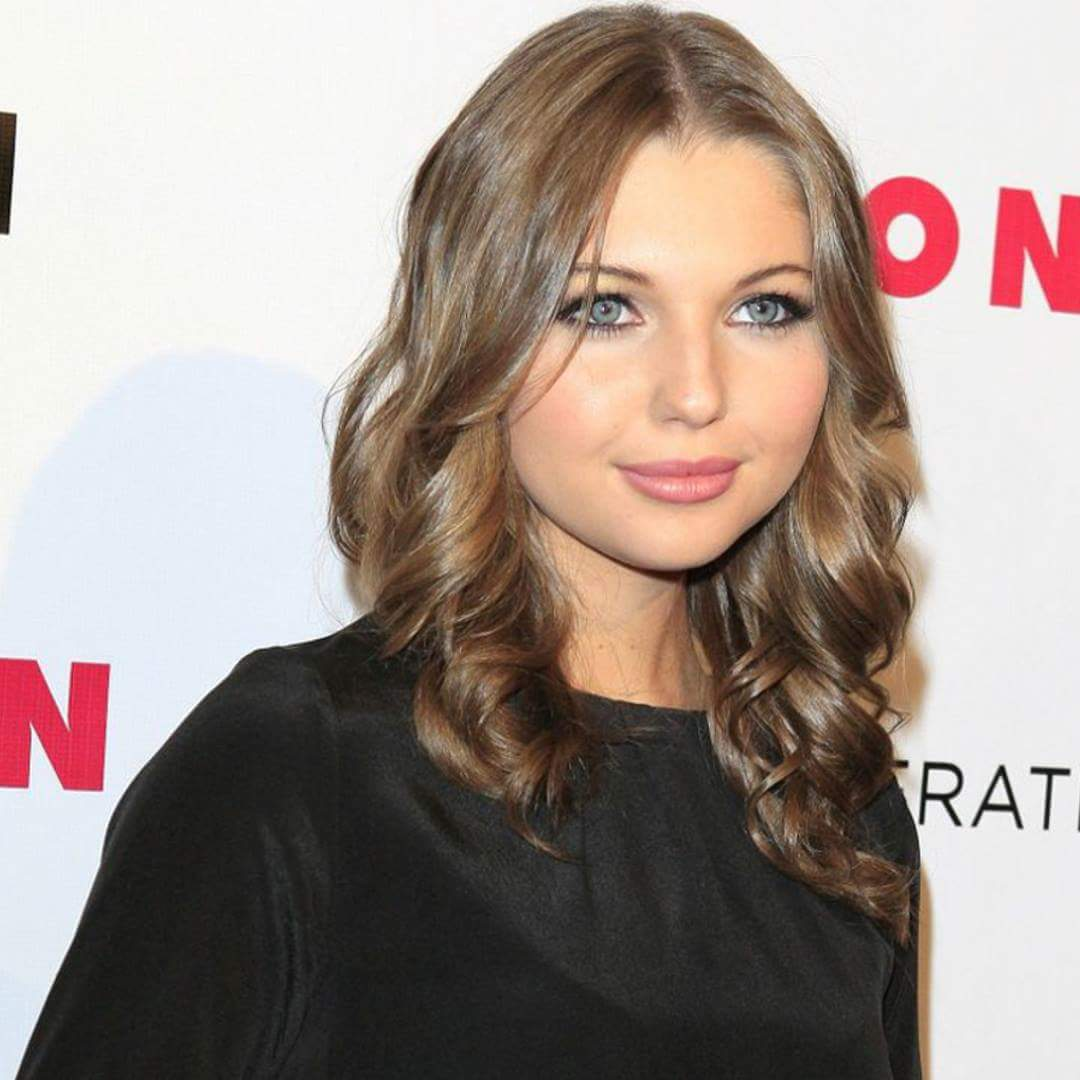 Sammi Hanratty public photo